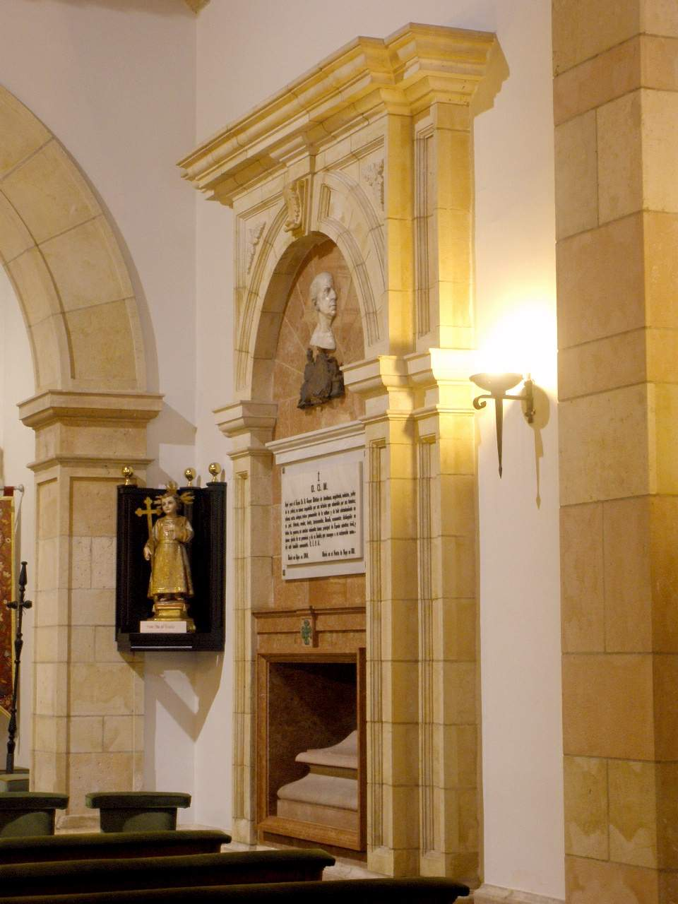 Sepulcro del político e ilustrado español Gaspar Melchor de Jovellanos (1744-1811) en la capilla de los Remedios de la ciudad de asturiana de Gijón, (España).